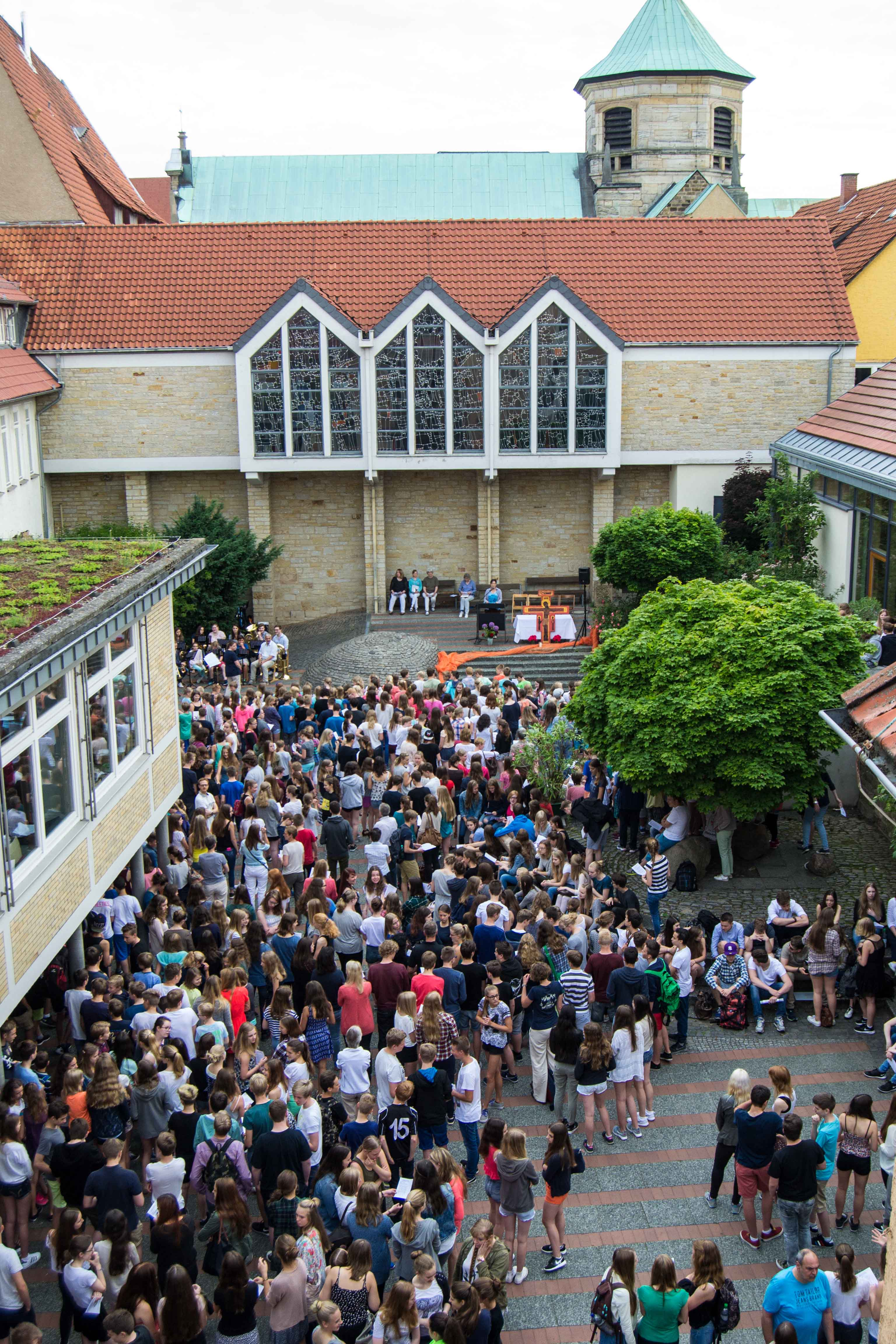 Schuljahresabschlussandacht 2015 - Innenhof mit Blick auf die Kapelle